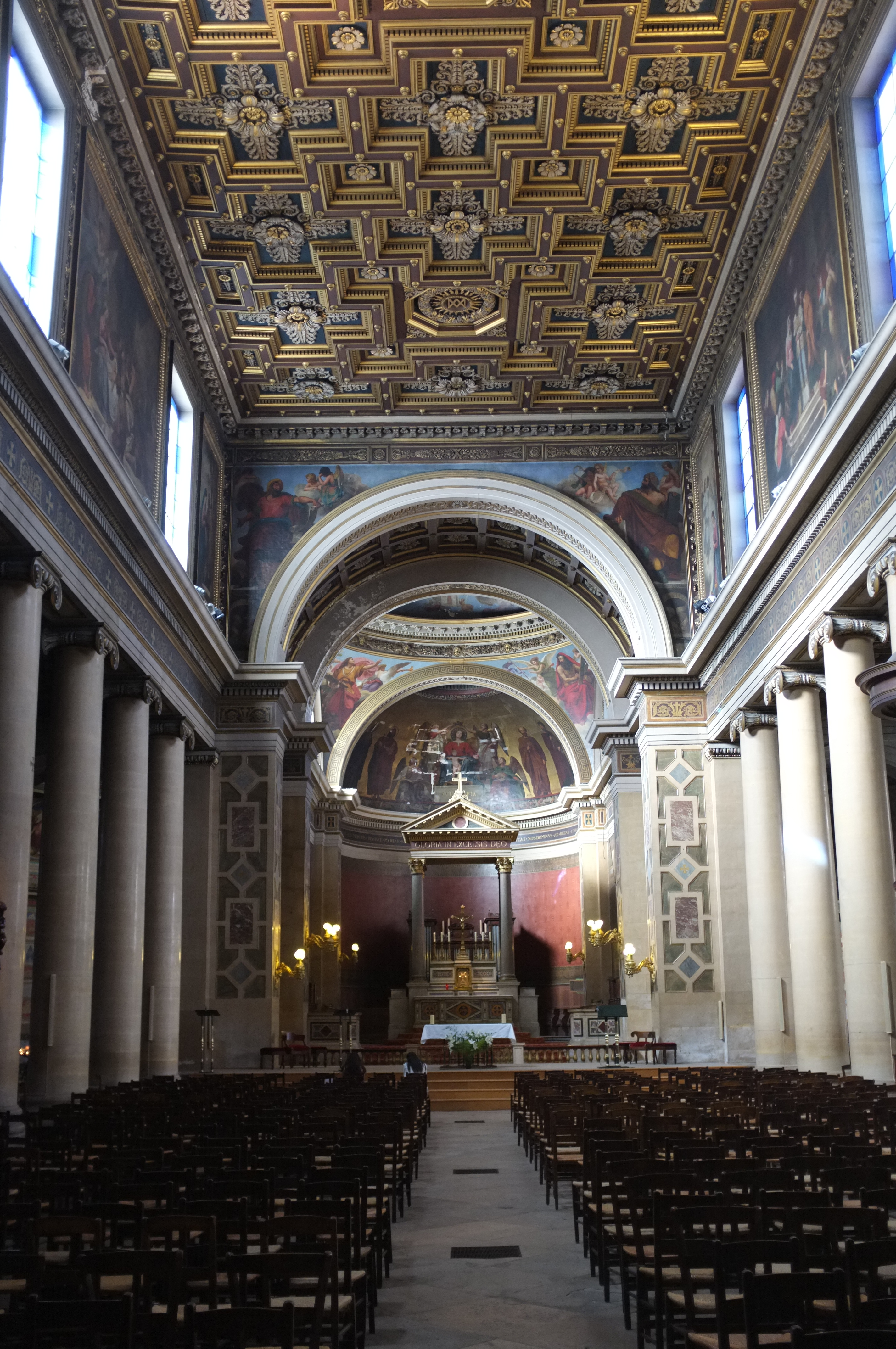 intérieur de l'Église Notre-Dame-de-Lorette (Paris) .